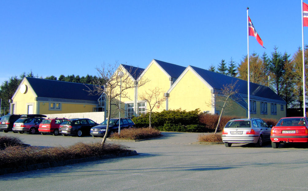 Ganddal bydelshus, Sandnes Norway